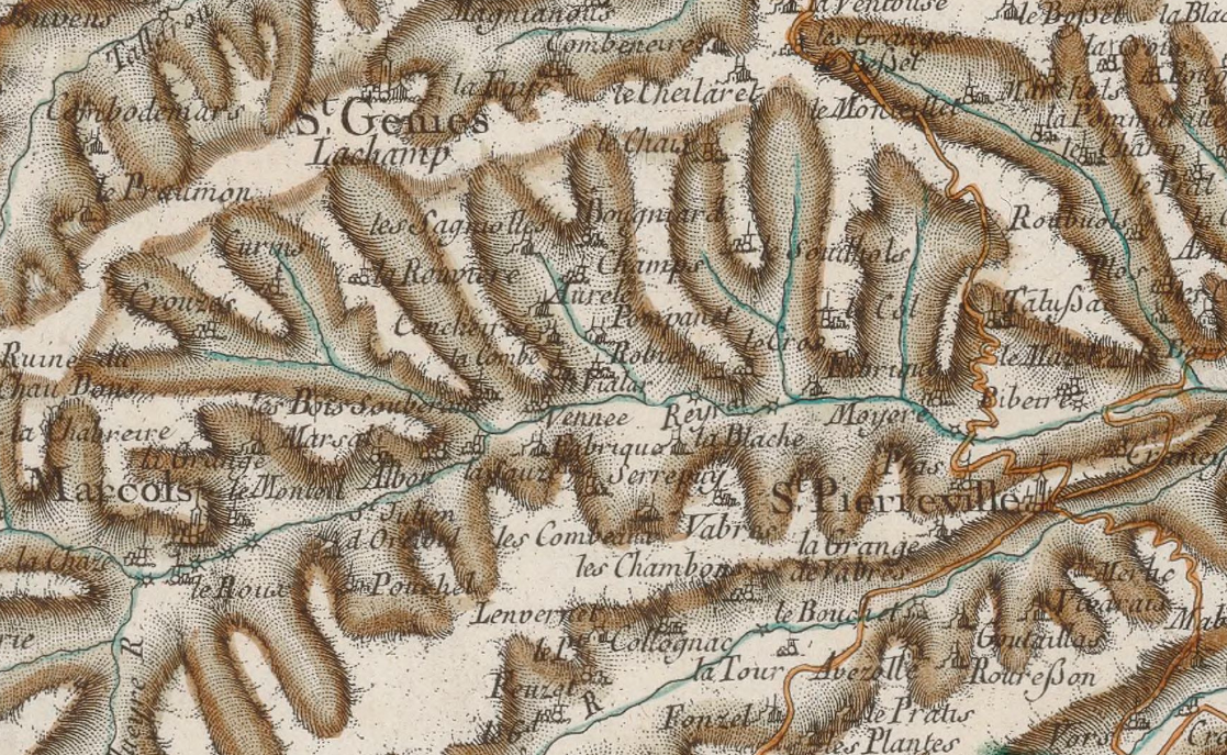 Albon-d'Ardèche sur la carte de Cassini éditée en 1777 sous la direction de César-François Cassini de Thury. Source : Bibliothèque nationale de France, département Cartes et plans, GE FF-18595 (89). Domaine public.